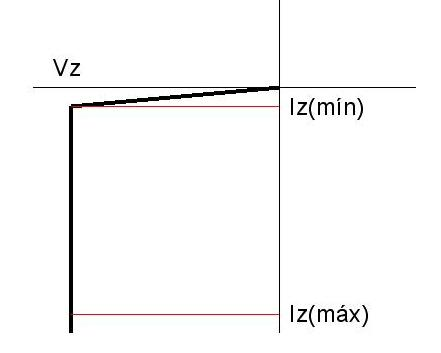 Curva de fucionamiento inverso del zener